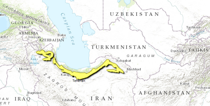 Ecoregione PA05-07 - Steppe forestali della catena dell'Elburz